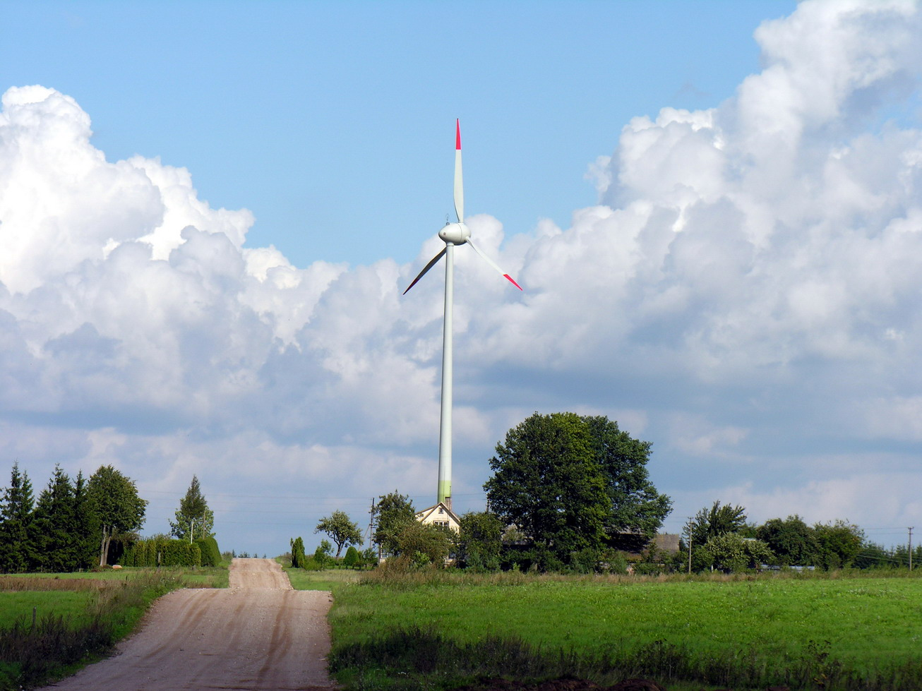 V?jo j?gain? Foto: Algirdas, 2006 m. rugs?jo 2 d., Lietuva